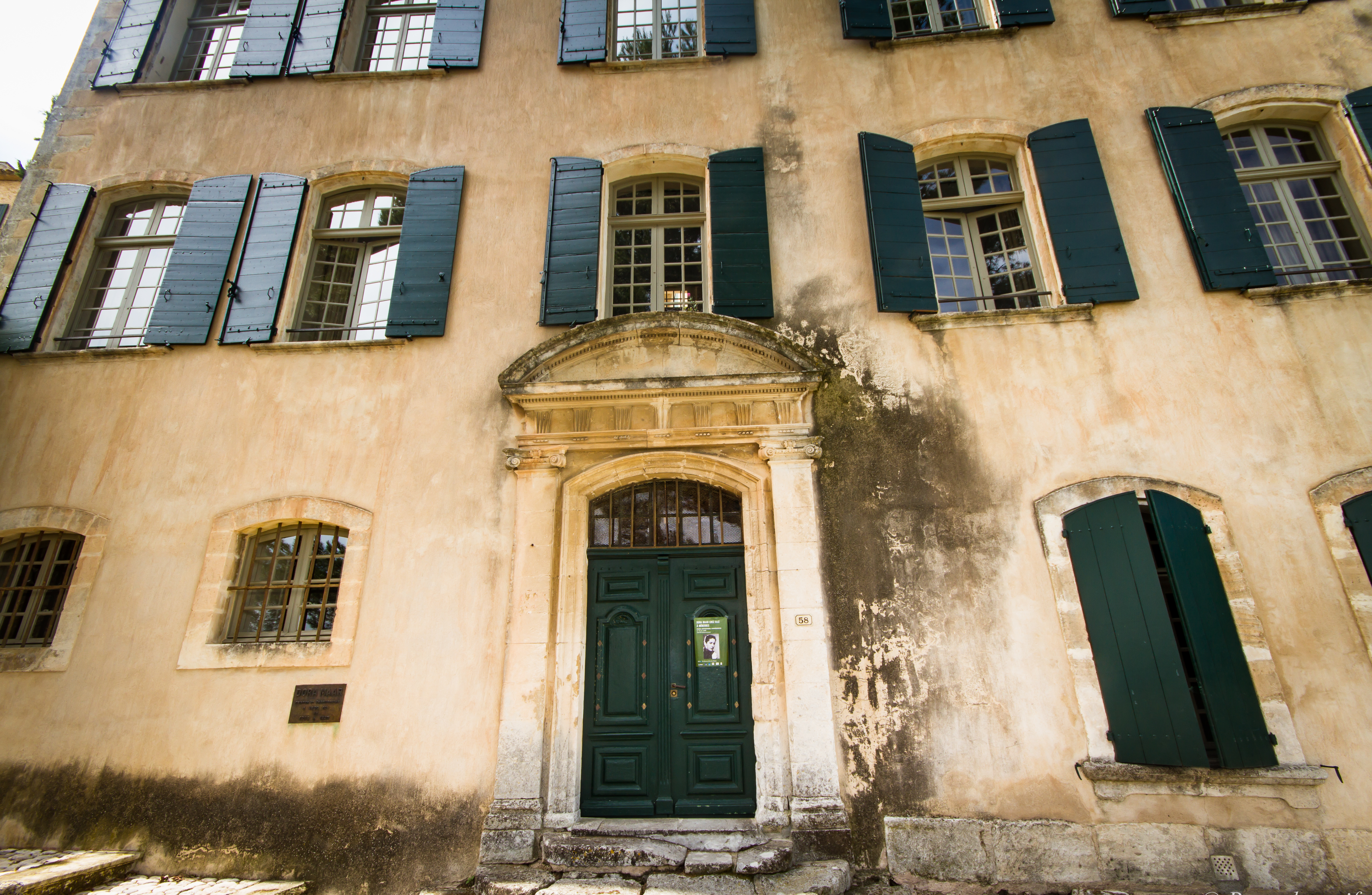 La villa de Dora Maar à Ménerbes